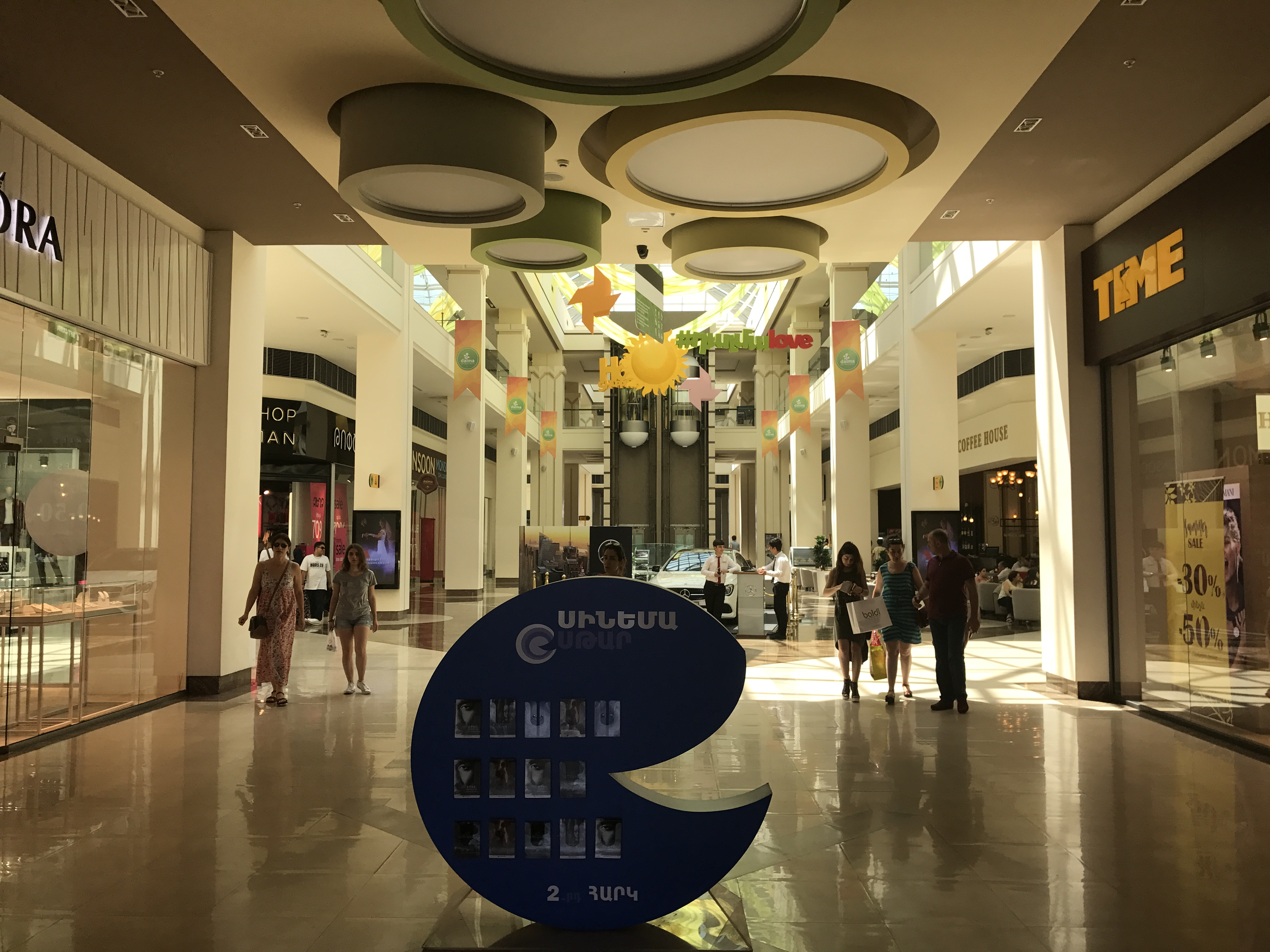 Dalma Garden Mall à Erevan en juillet 2017.